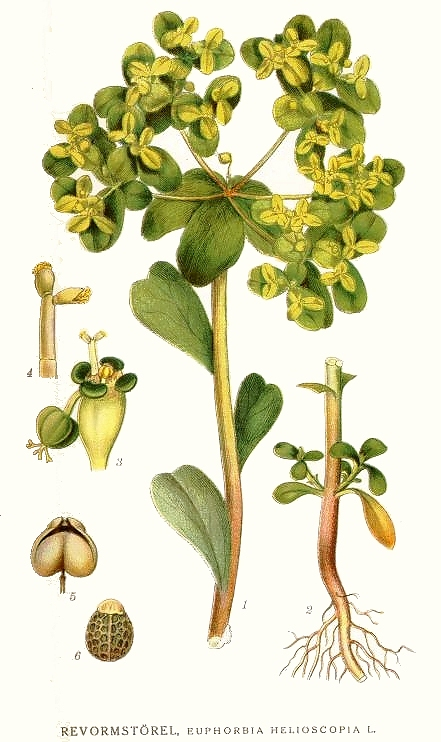 Original Description Revormstörel, Euphorbia helioscopia L.